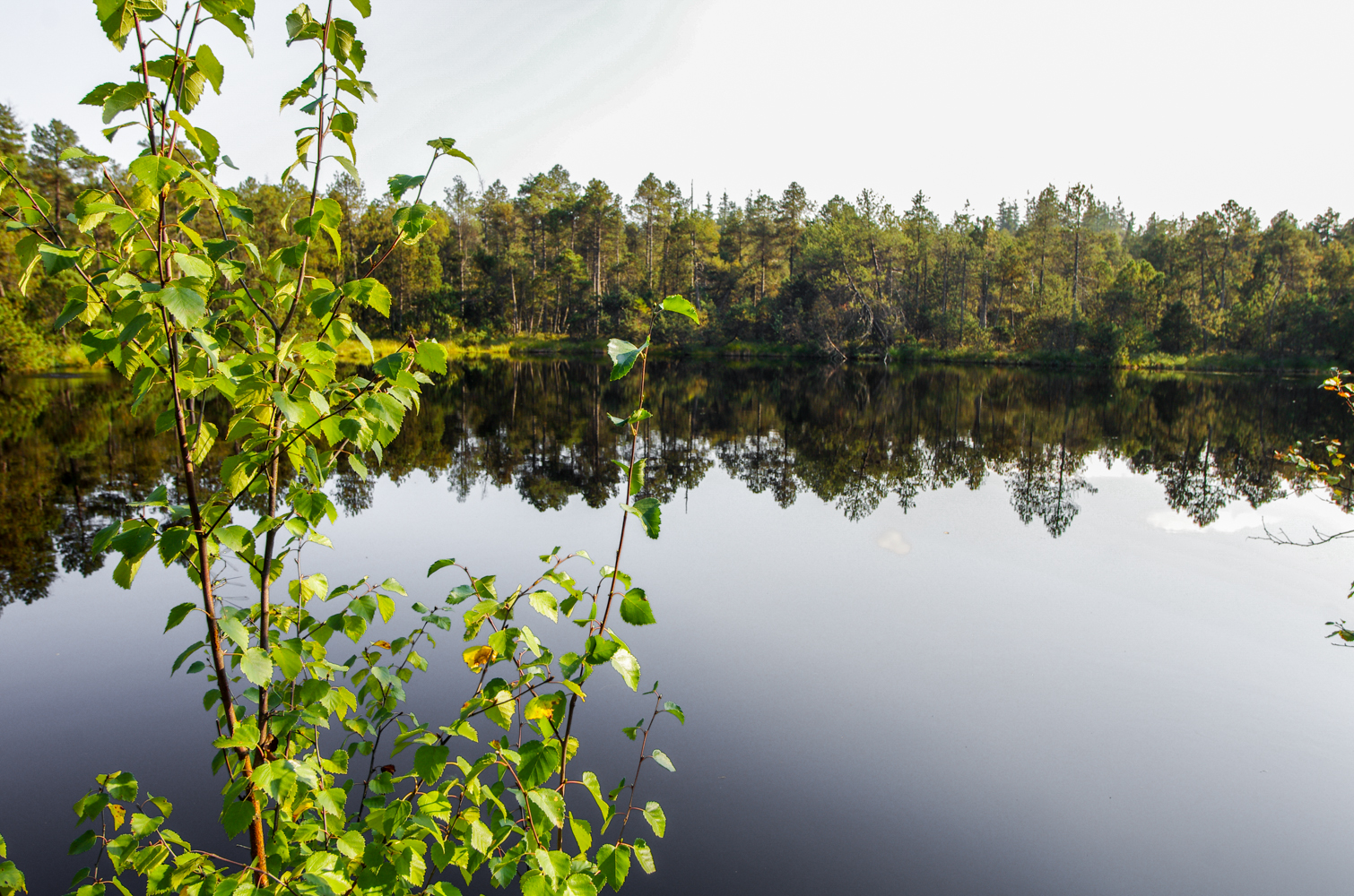 Národní přírodní rezervace Rejvíz, Velké mechové jezírko, okres Jeseník